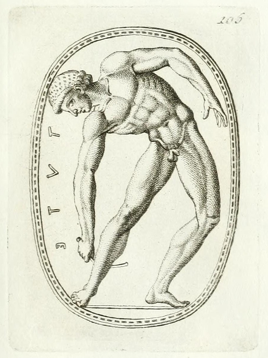 Etruskischer Skarabäus mit Tydeus Kupferstich aus den Monumenti antichi inediti von Johann Joachim Winckelmann